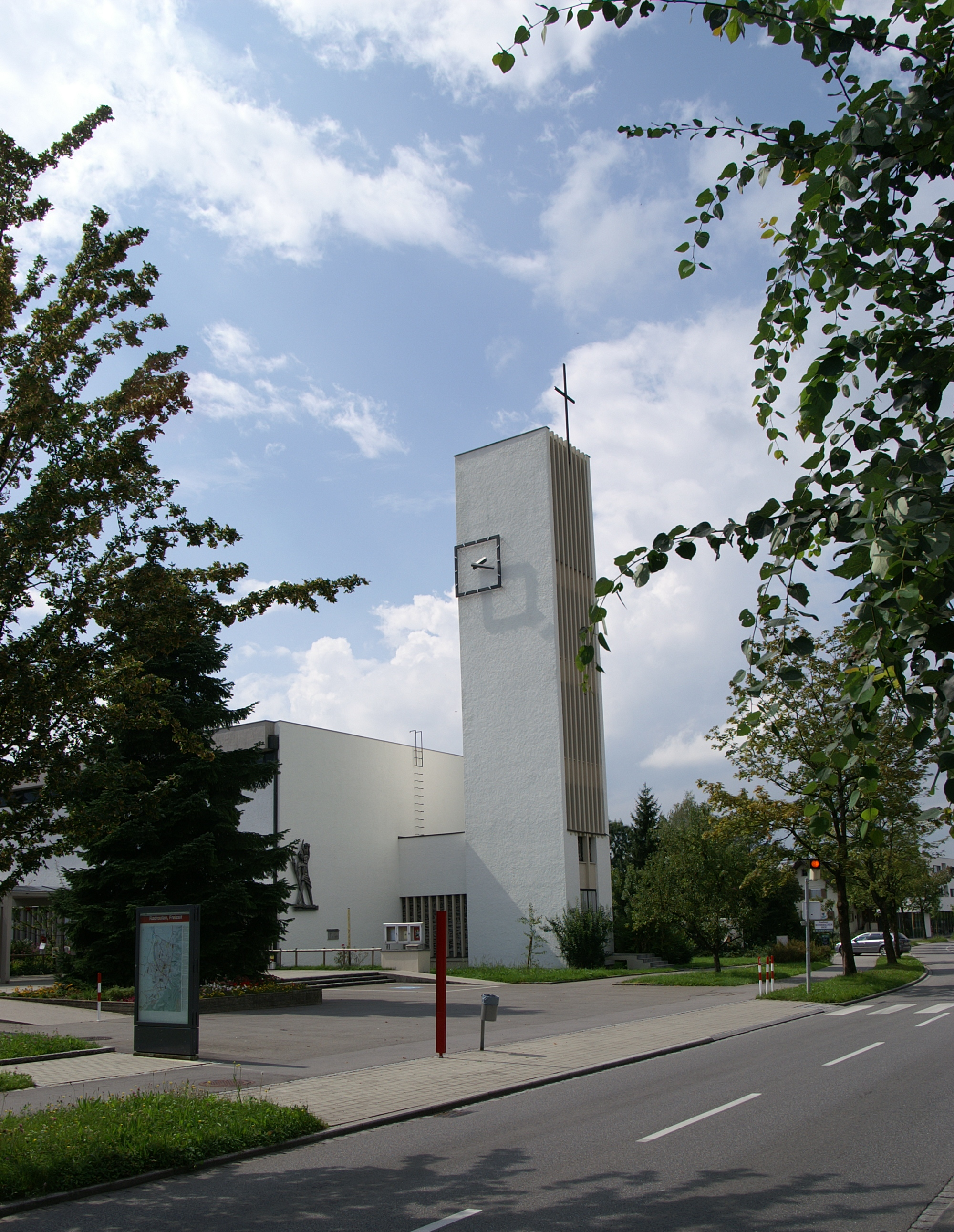 Pfarrkirche St. Christoph im Rohrbach in Dornbirn erbaut nach Pänen von Norbert Kopf und Norbert Klotz in den Jahren 1963/64